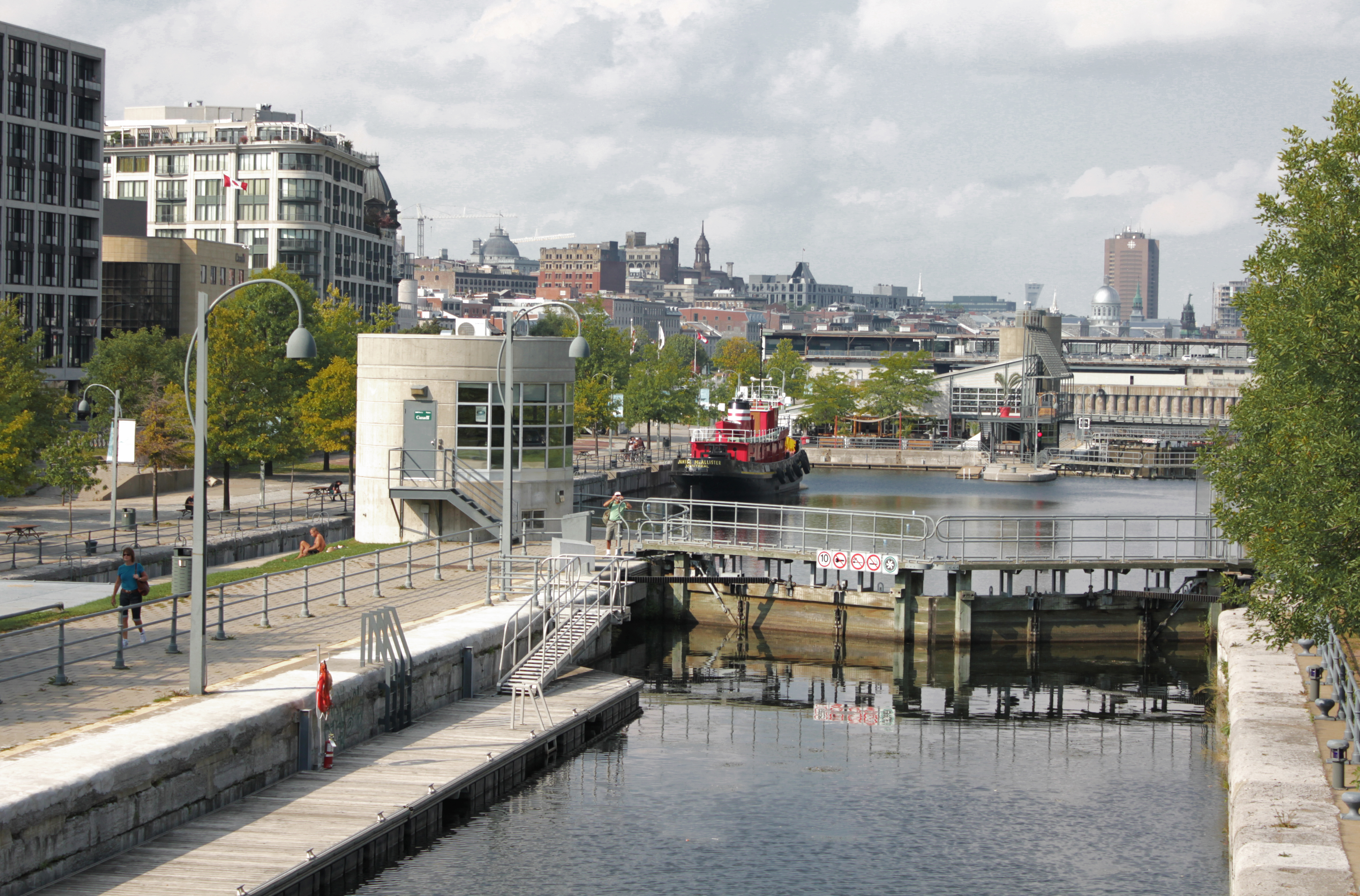 Le canal Lachine dans le vieux Montréal